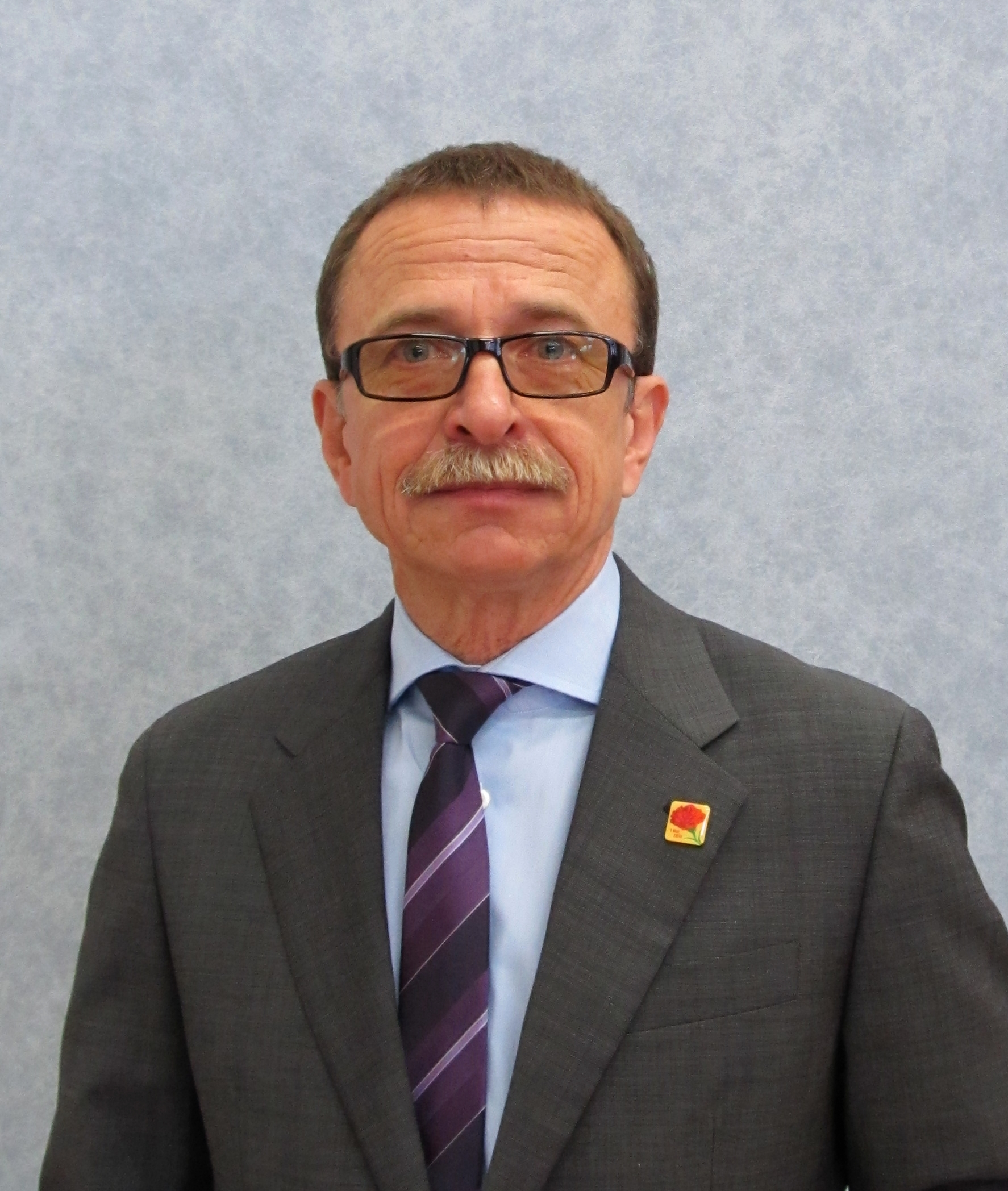 Claus Matecki (Mitglied des geschäftsführenden Bundesvorstandes des Deutschen Gewerkschaftsbundes) in Bestwig (Germany)